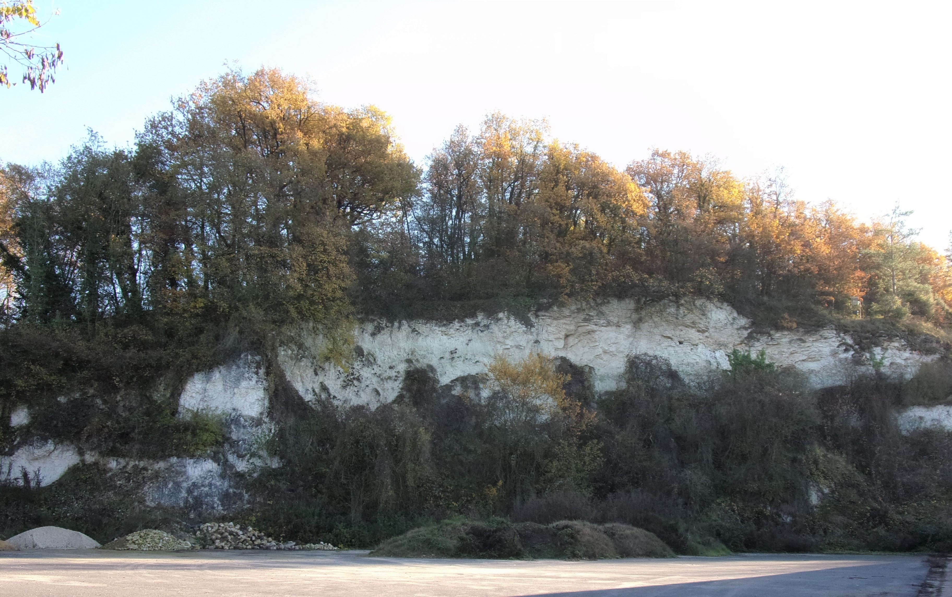 Carrière de pierre à Cormery